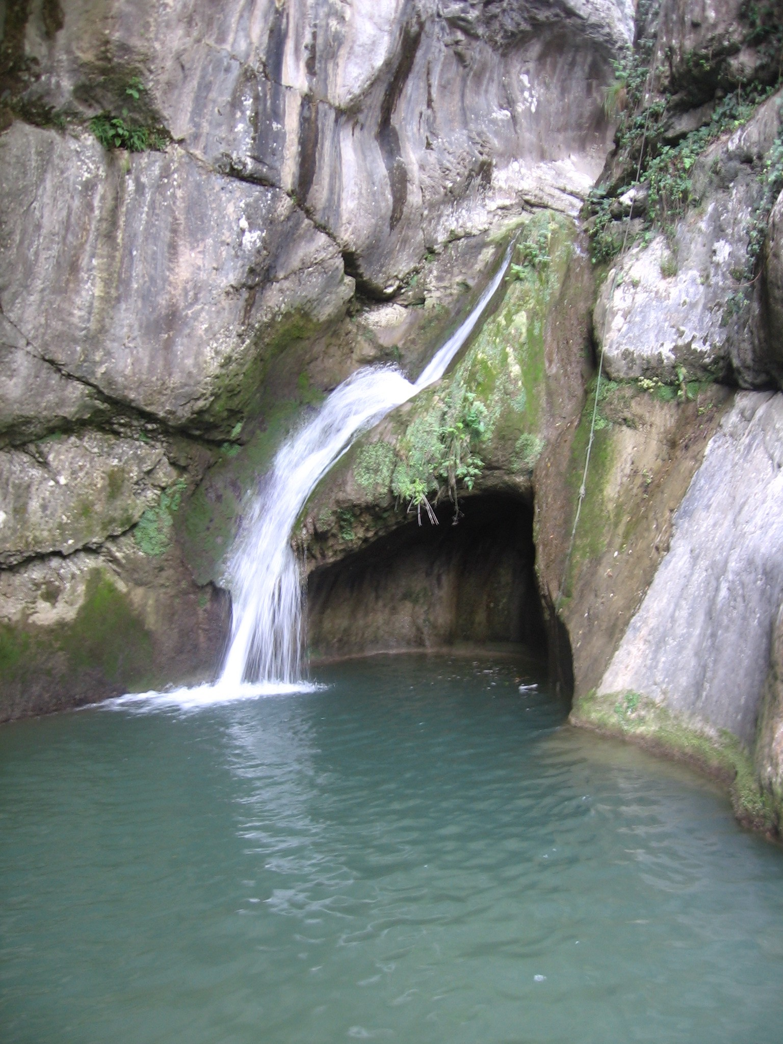 Torrente Nesa, Alzano Lombardo, Bergamo, Italy